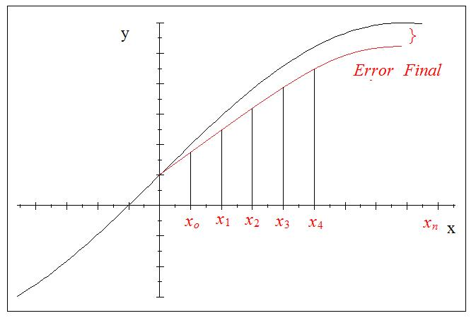 Aplicación repetida del método de Euler